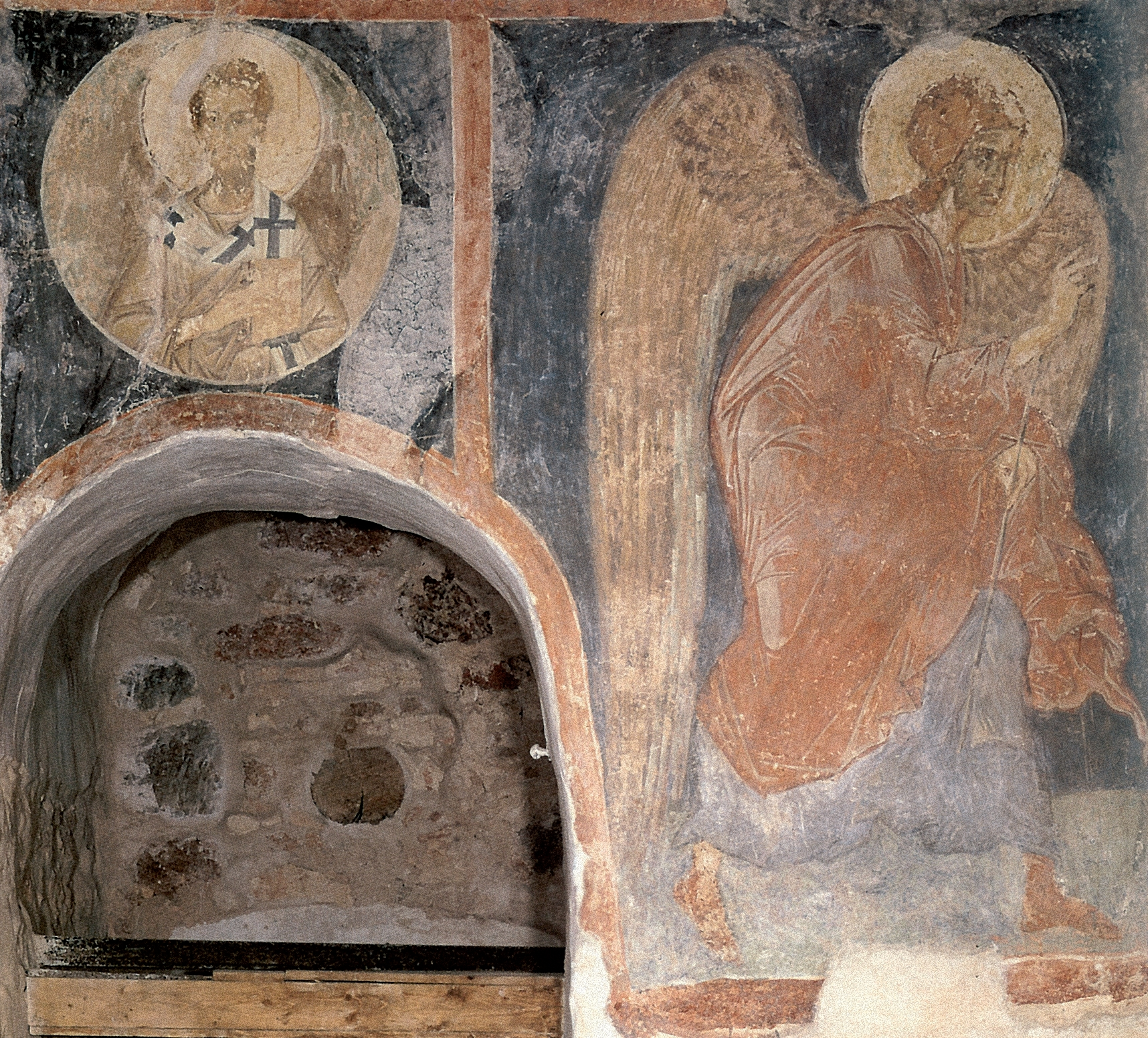 Фреска церкви Рождества Христова в Великом Новгороде. XIV век.